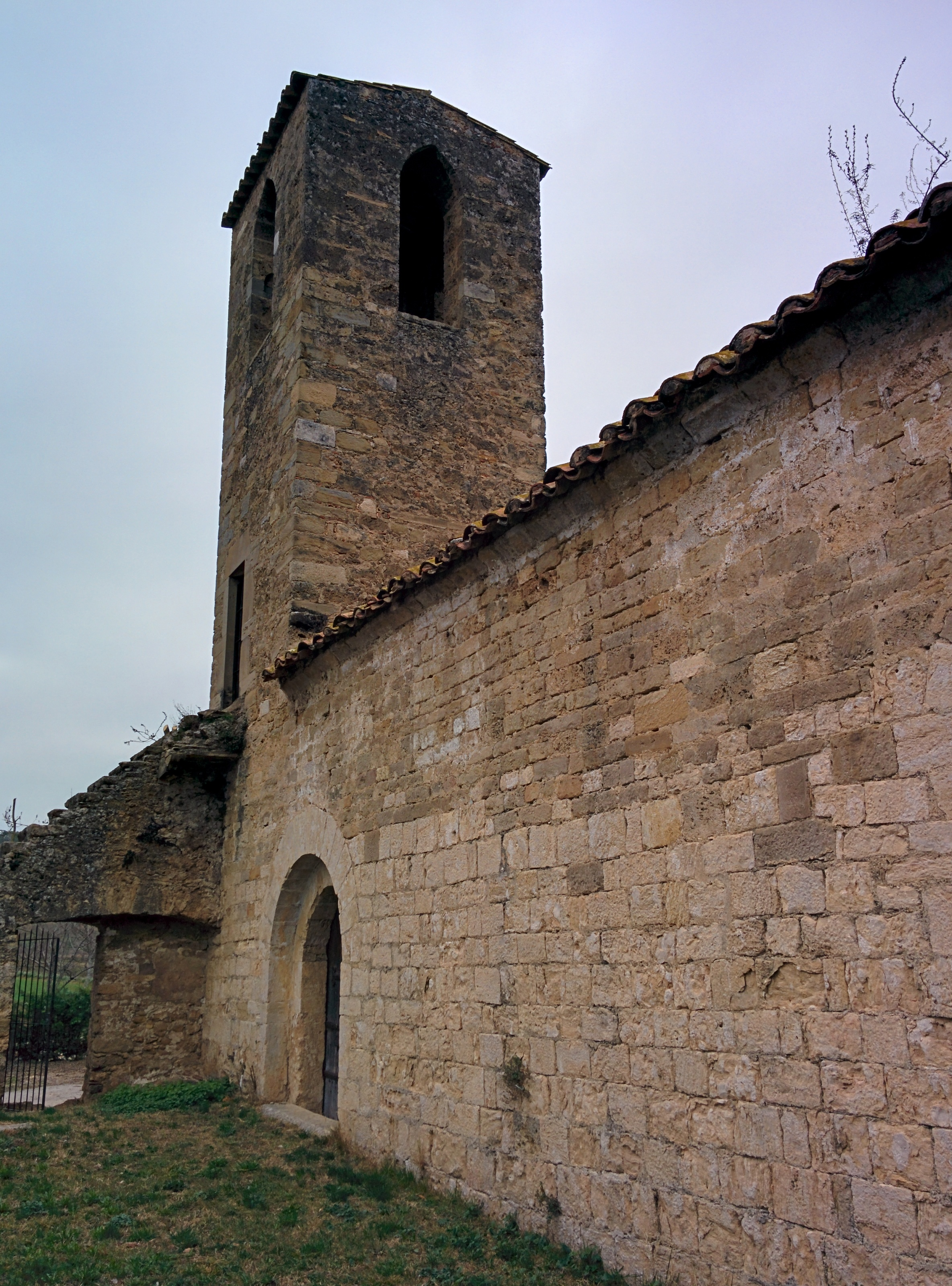 Església de Sant Andreu (Cornellà del Terri)